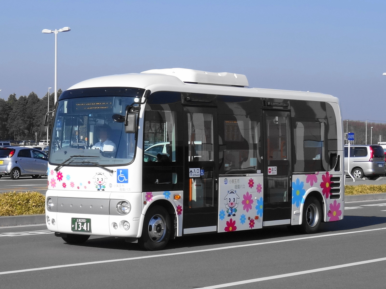 Omitama City loop line